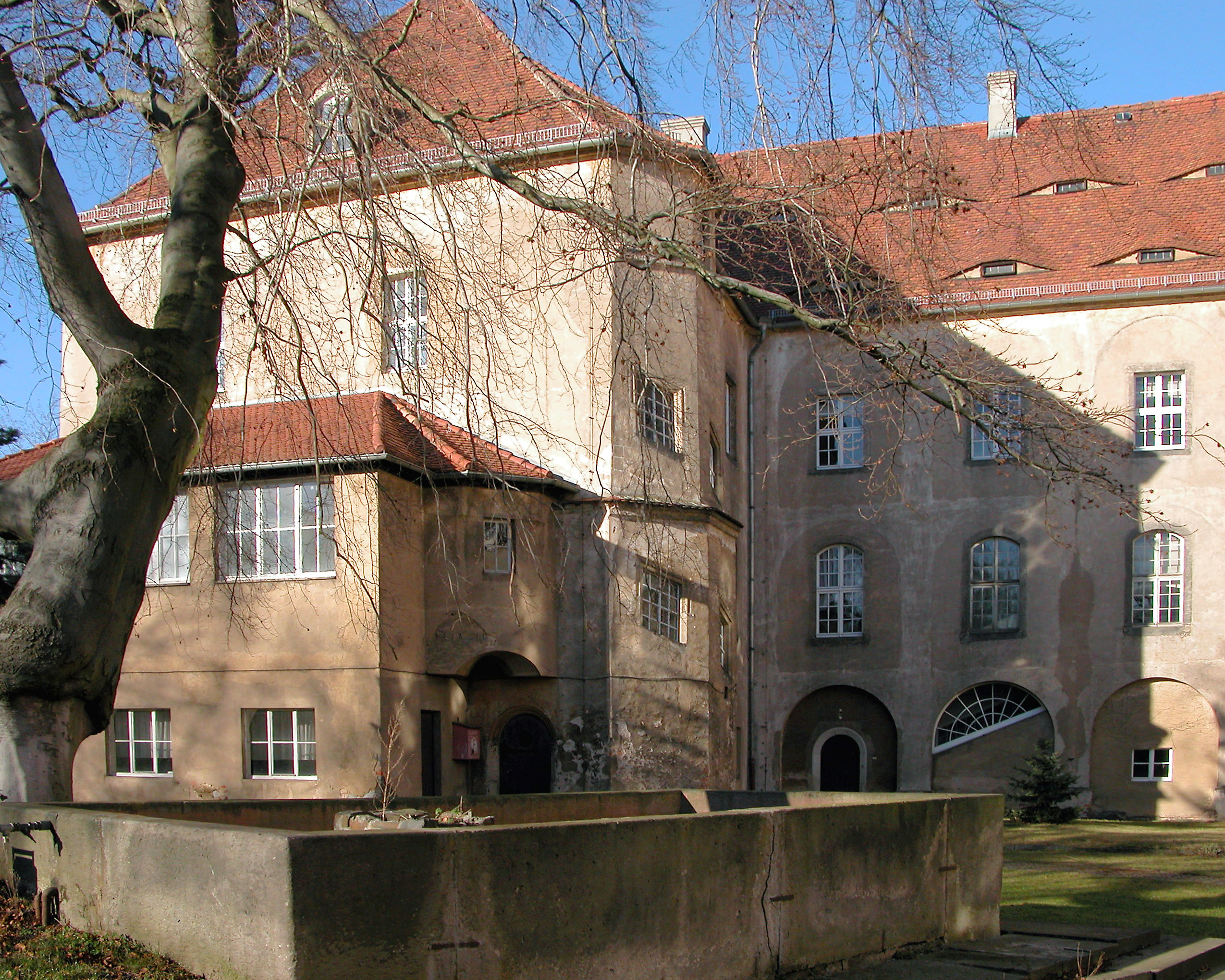 08.01.2005 01936 Königsbrück: Barockschloß (um 1700 mit Resten aus der Renaissance (16. Jh.). In der DDR Krankenhaus. Sicht von Osten. [DSCN5726.TIF]20050108280DR.JPG(c)Blobelt